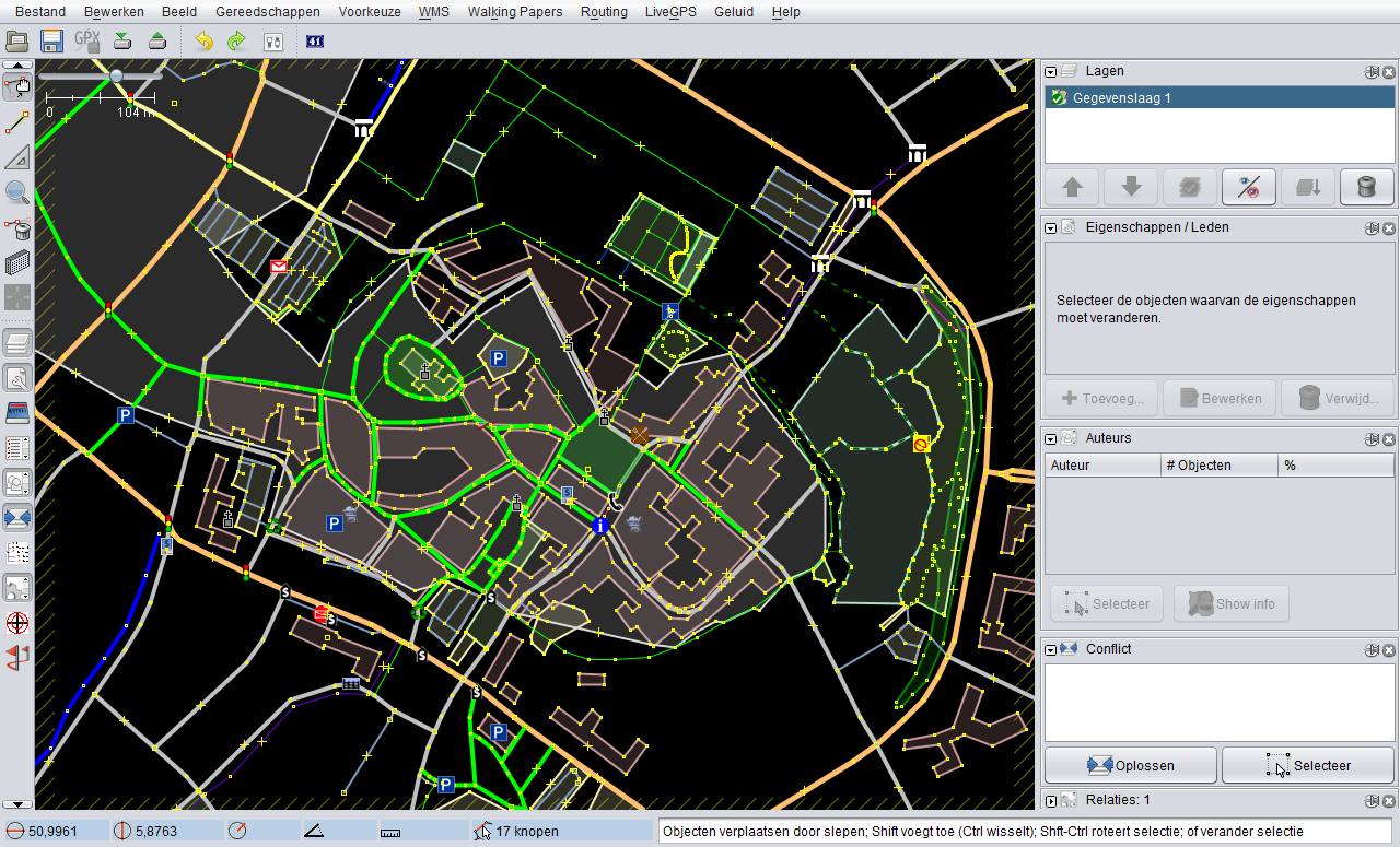 Screenshot van het programma JOSM met een gedownloade kaart. This map may be incomplete, and may contain errors. Don't rely solely on it for navigation.